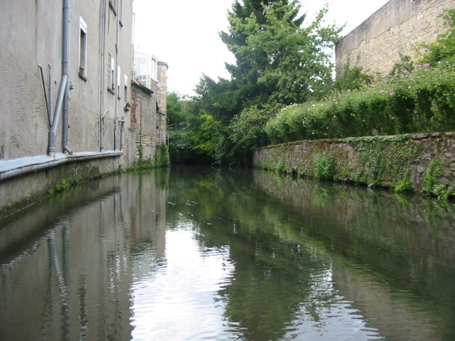 La rivière Nièvre est un affluent qui se jette dans la Loire à Nevers, offrant de superbes chemins de promenade.